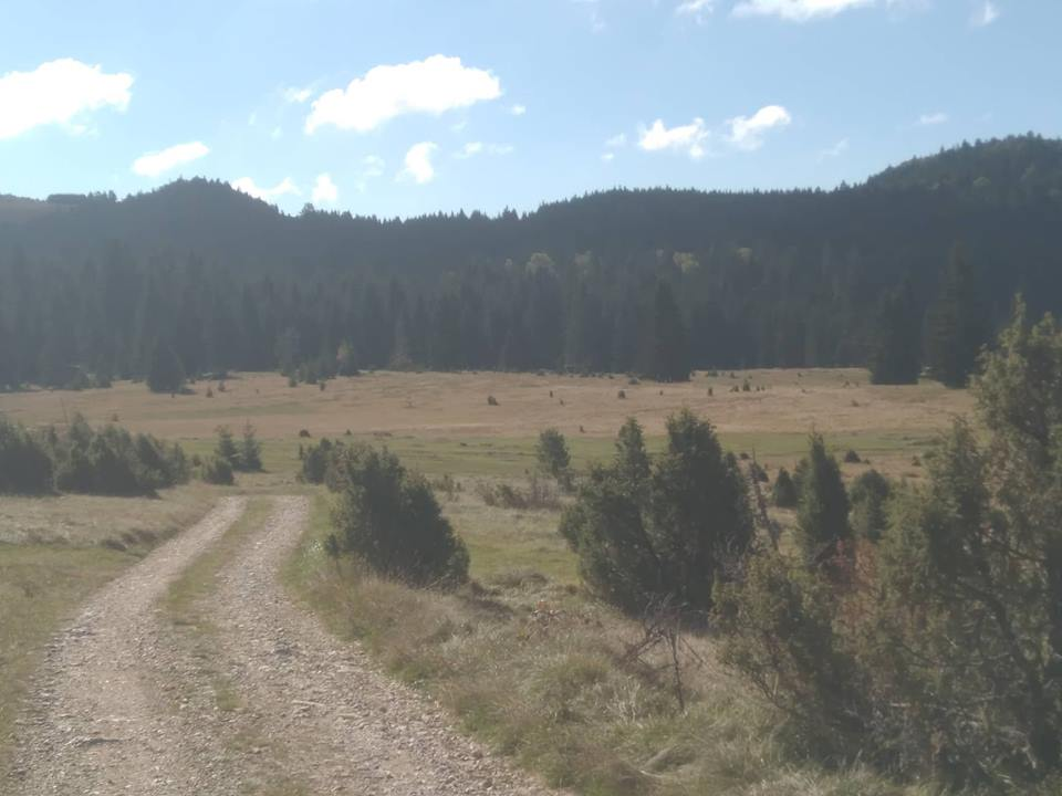 Пут на Бесеровачким Барама